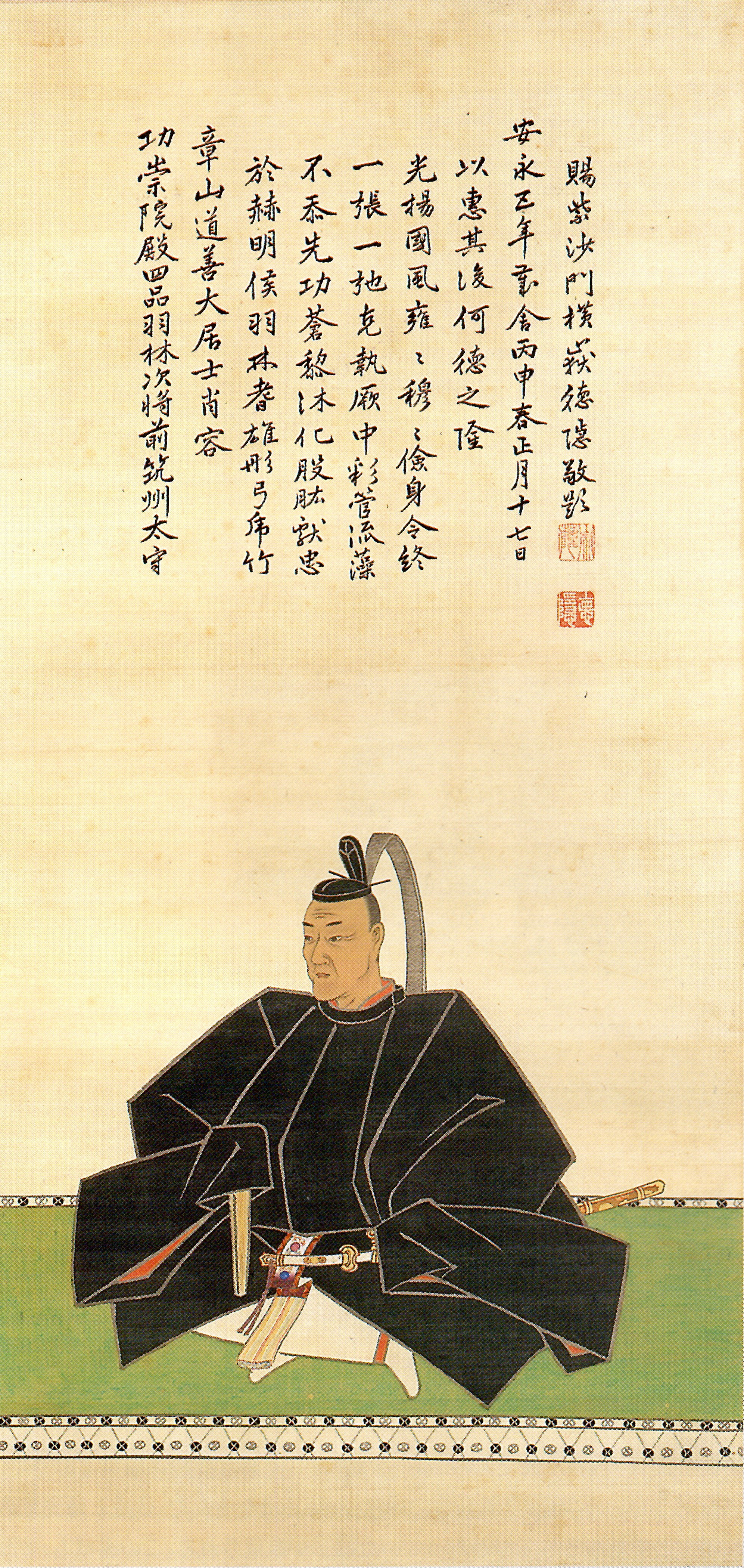 黒田継高の肖像。